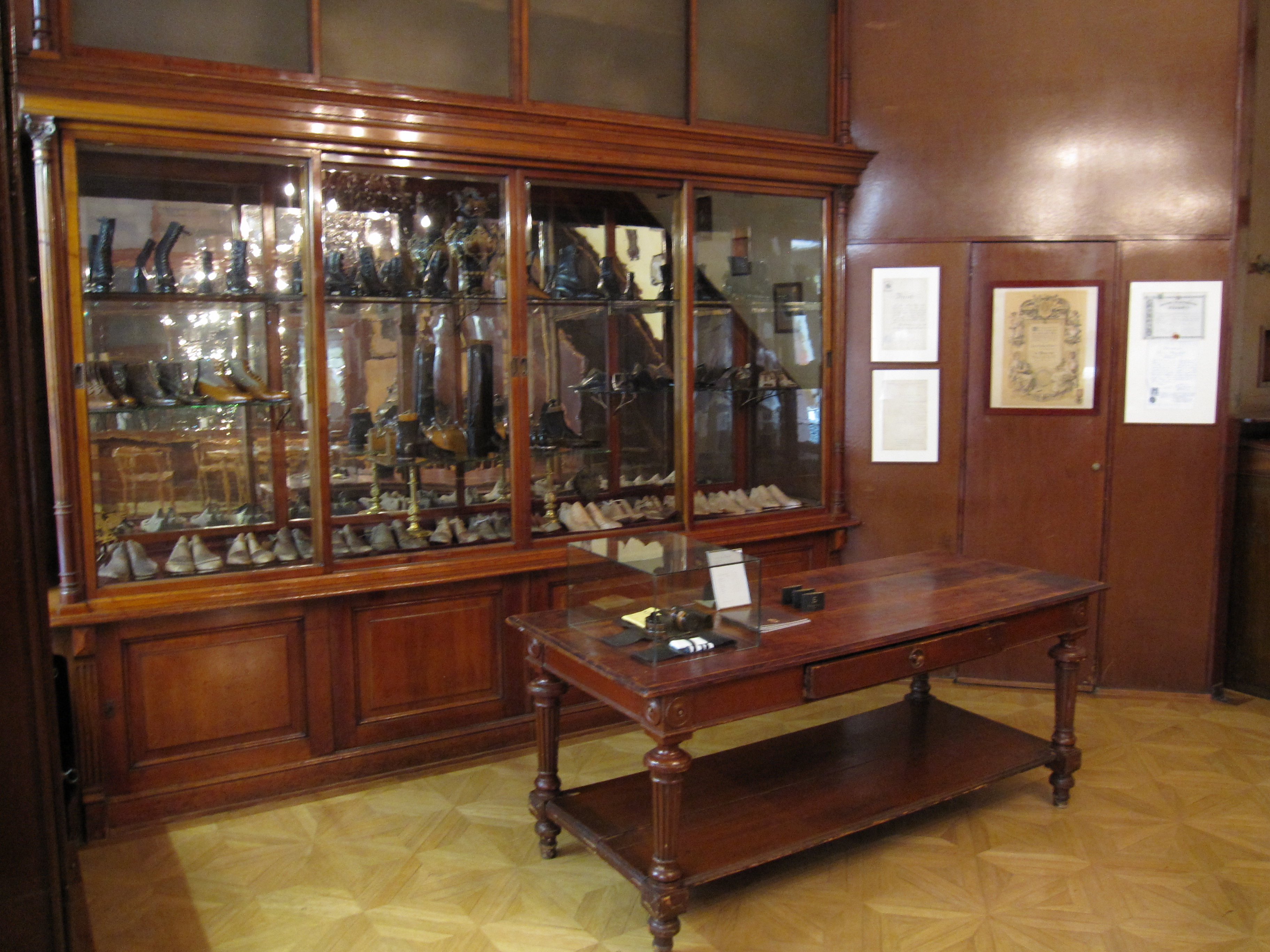 Rudolf Scheer & Söhne in Vienna's I. district